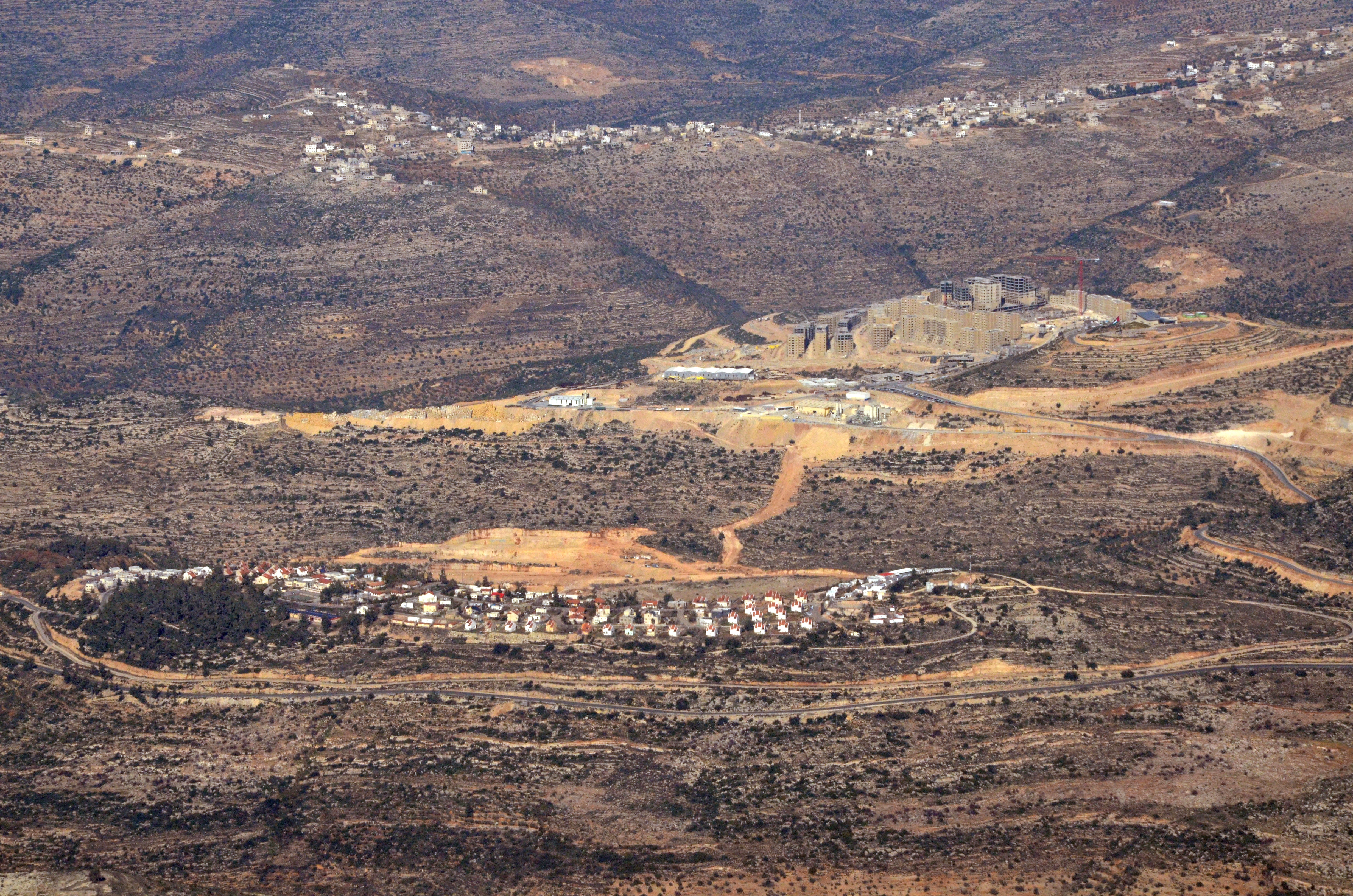 הישוב עטרת והעיר רוואבי (בבניה)